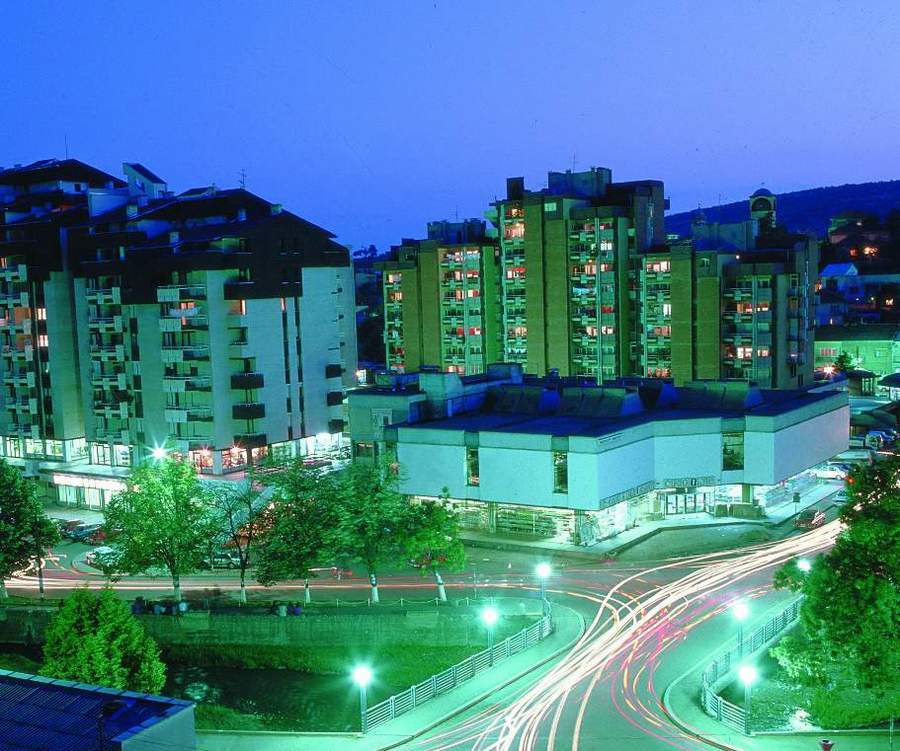 Kočani navečer